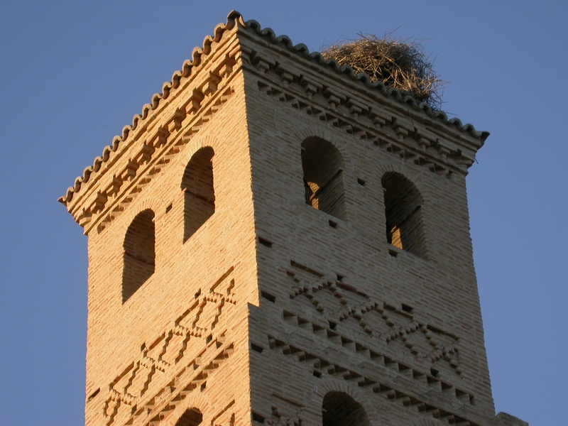 Subida por Eduardo Romero, webmaster de